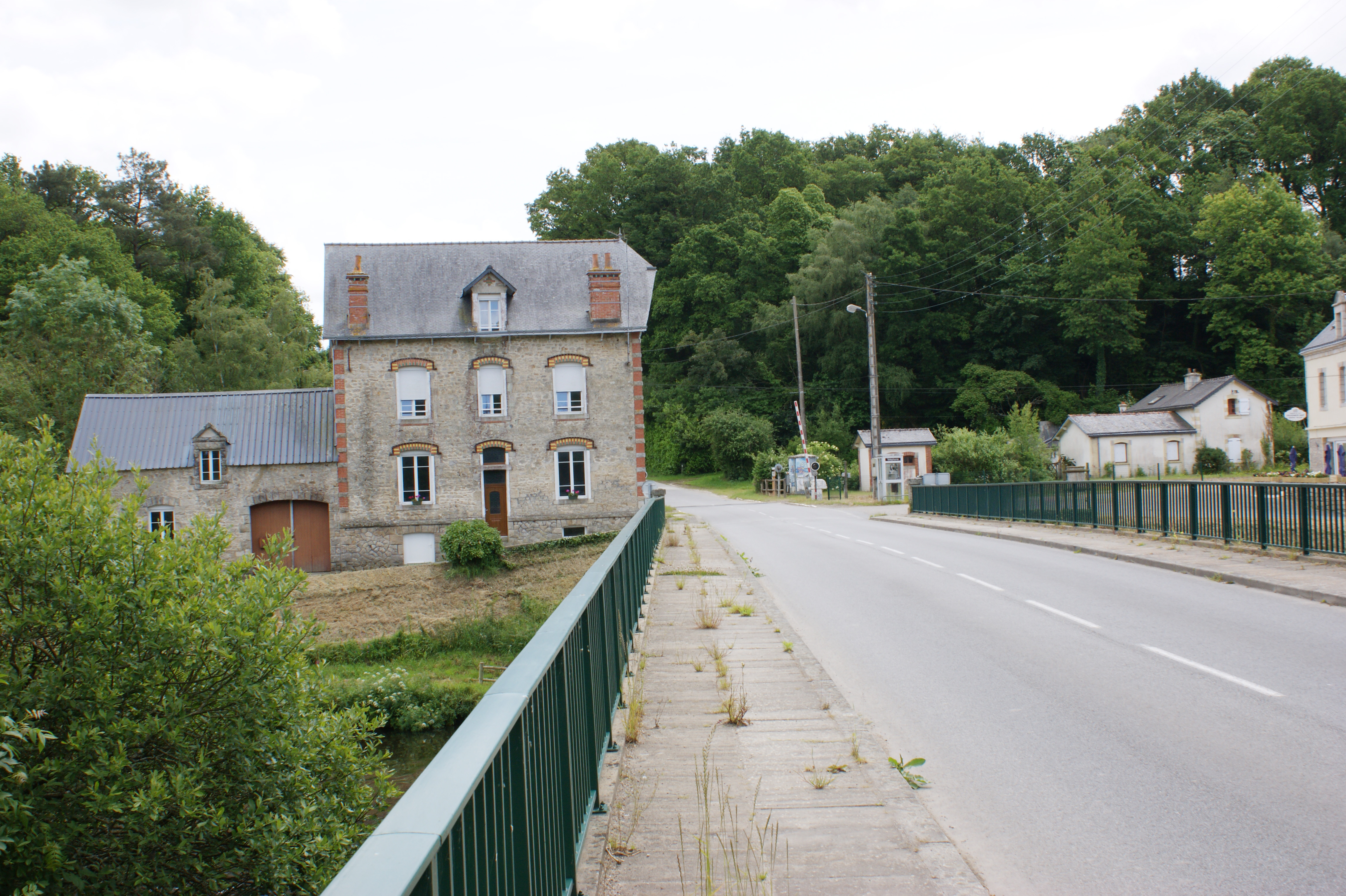 Anciens bâtiments de la gare de Saint-Rivalain.